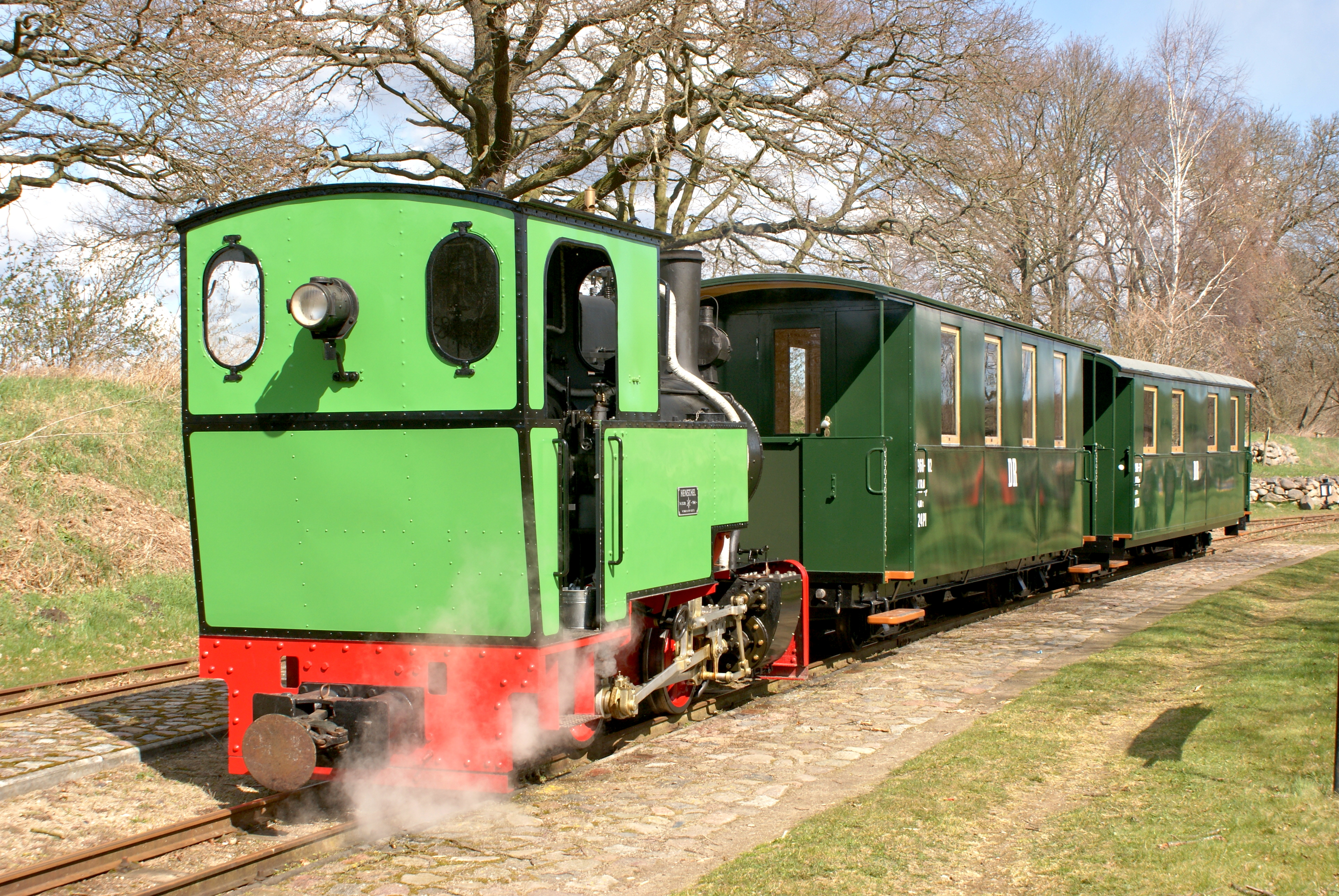 Dampflokomotive Typ "Riesa" (Henschel 28026/1948 , B n2t) der MPSB in Uhlenhorst am 08. April 2012